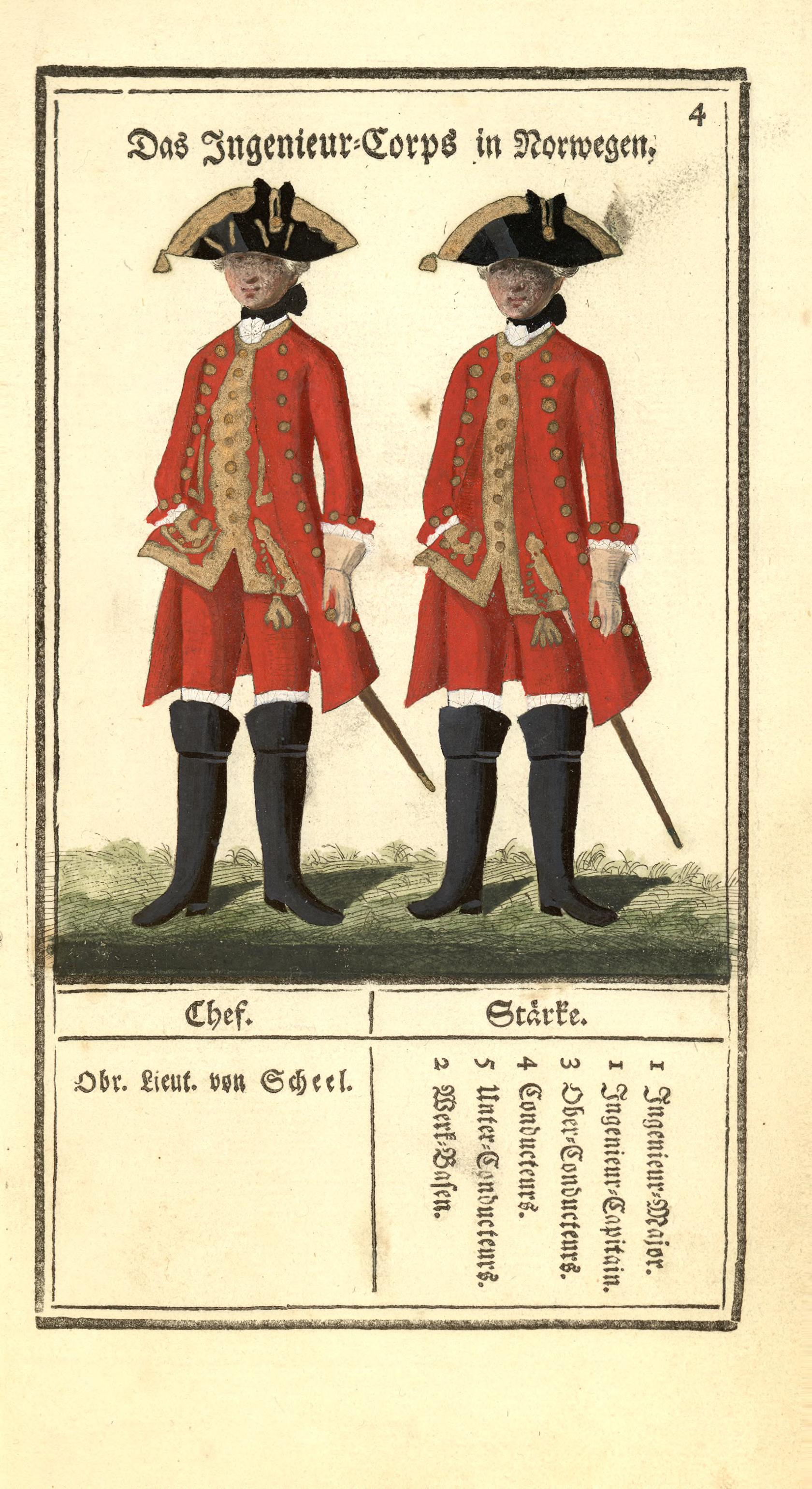 Illustrasjon hentet fra boken "Vorstellung der sämtlichen Königl. Dänischen Armee" av Bertram, Carl og utgitt av Carl Bertram (dk, 1763)